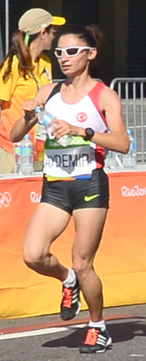 Passage du marathon des jeux olympiques de Rio 2016 dans le centre de Rio